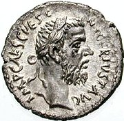 Portret van Pescennius Niger op een denarius.